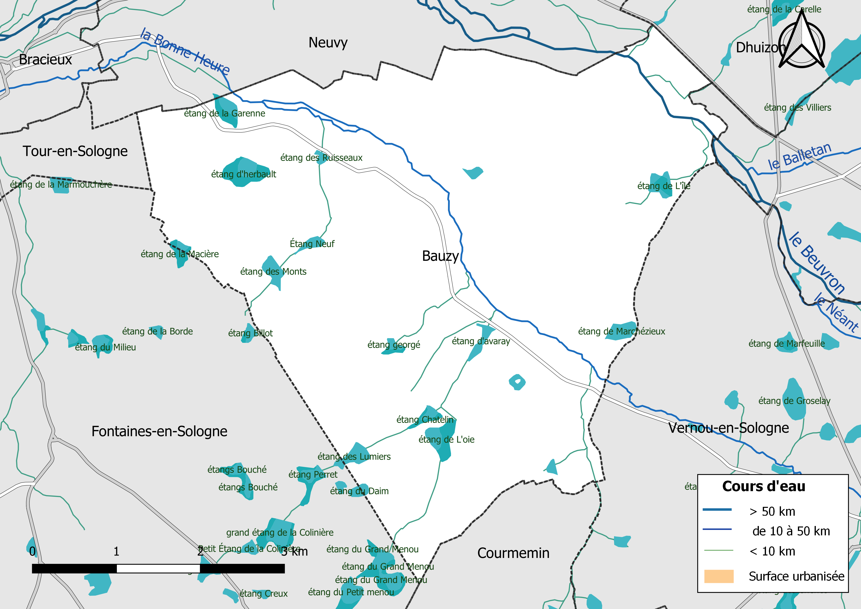 Carte du réseau hydrographique de la commune de Bauzy (France).